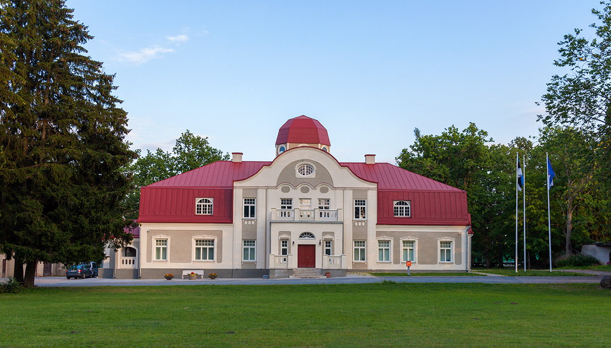 Kiiu mõisa taastatud ajalooline ilme peale 2018. aastal lõpetatud renoveerimist.